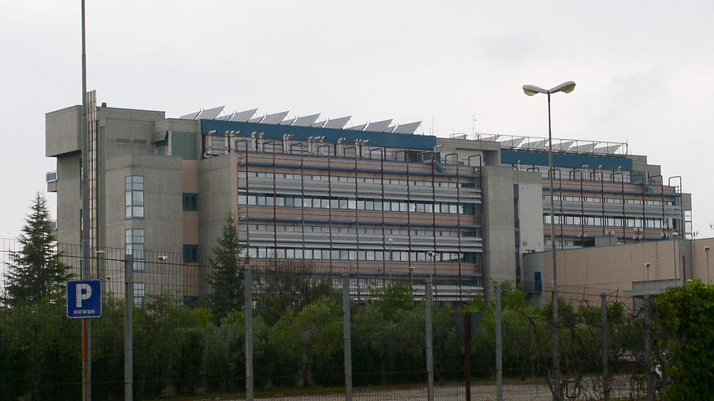 Il Centro Mario Negri Sud. Santa Maria Imbaro (CH), 3 giugno 2007. Foto scattata da me.